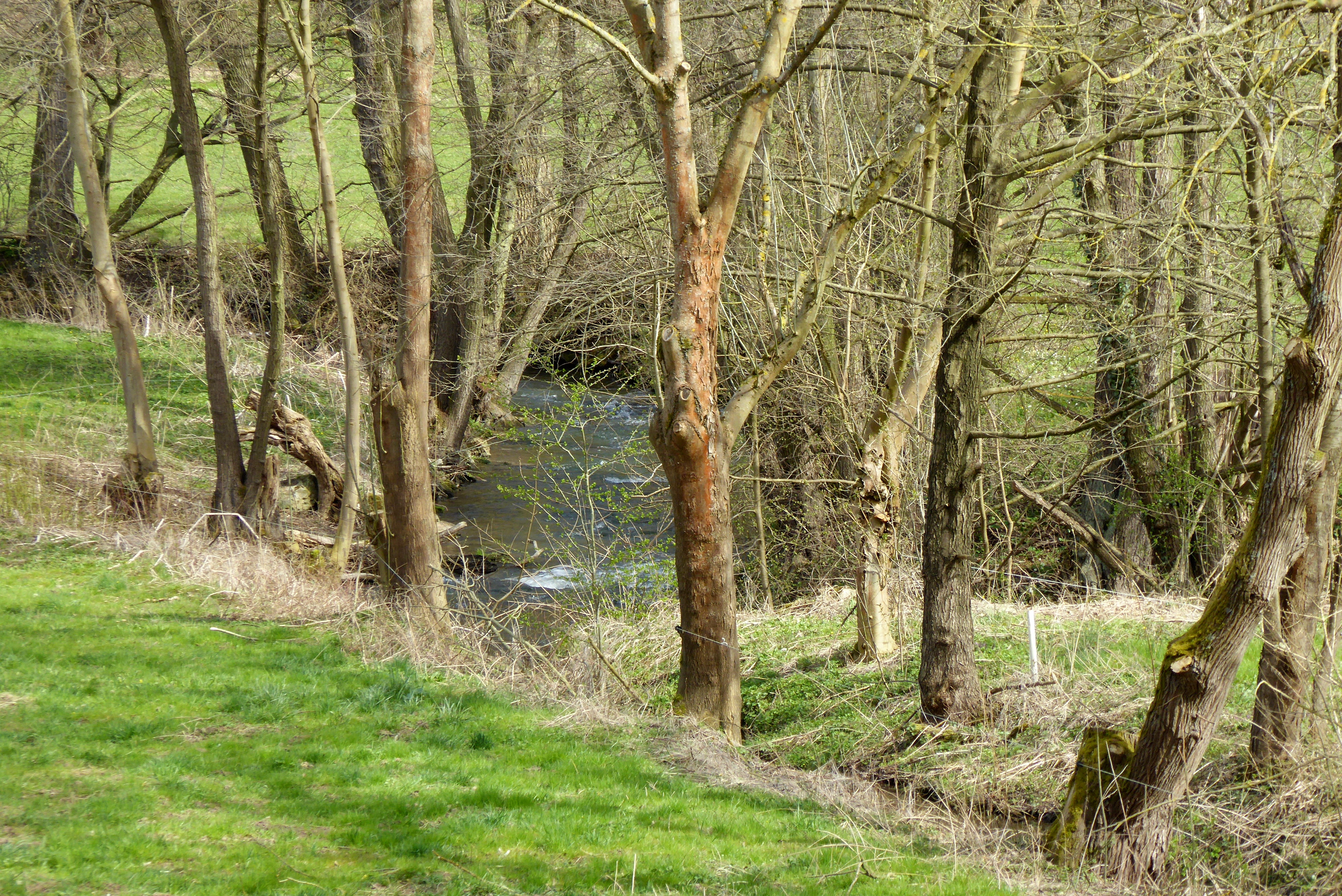 Mündung des Dohrenbachs in die Gelster nordwestlich des Ortes Dohrenbach, Stadt Witzenhausen, Nordhessen. Blickrichtung ist etwa nach Ostsüdosten: Der Dohrenbach ist auf dem Foto der Graben, der von der unteren rechten Bildecke bis etwas links der Bildmitte fließt. Die Gelster ist auf dem Bild (umgekehrt) S-förmig von rechts kommend erkennbar und fließt nach links aus dem Bild.